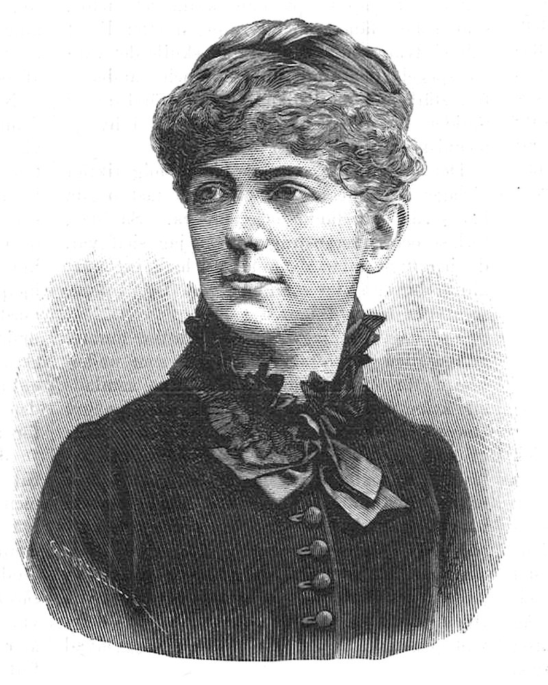 Emilie Lundberg (1858-1889)